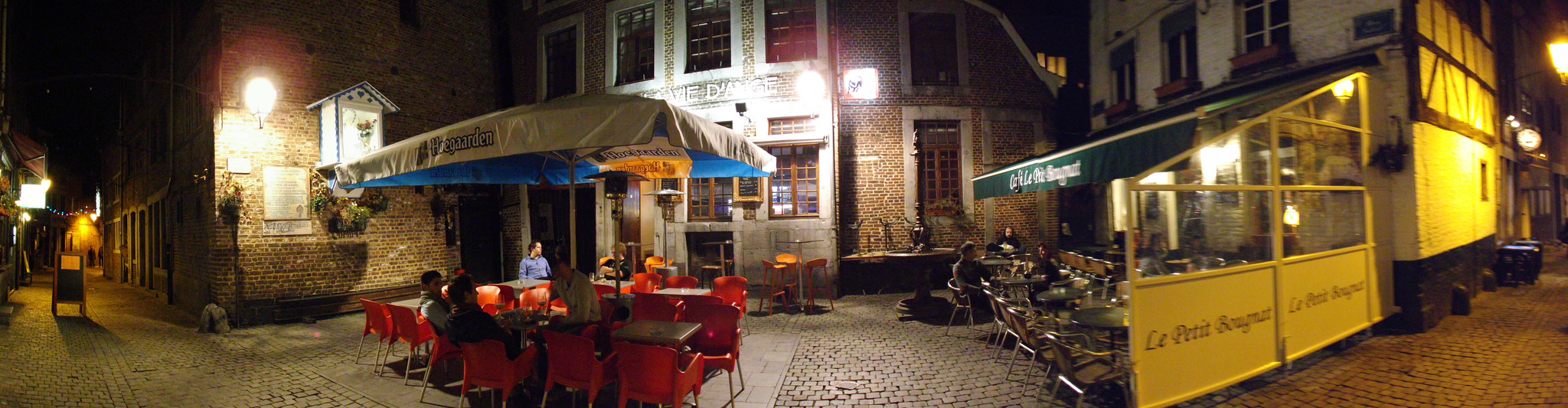 Liège Outremeuse rue roture